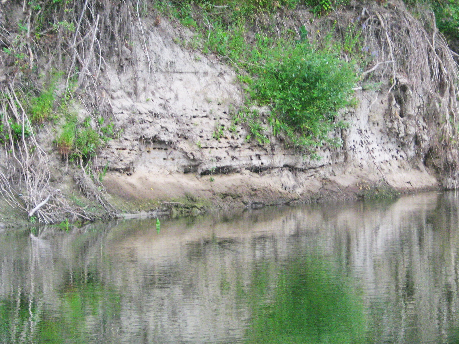 Берег реки Сейм (в районе села Хижки). видны норки береговых ласточек